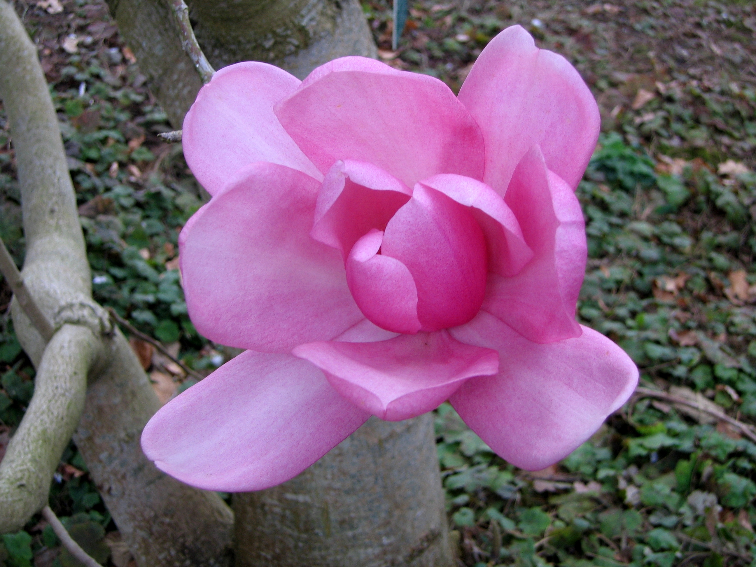 Une fleur de Magnolia campbellii au parc floral à Paris